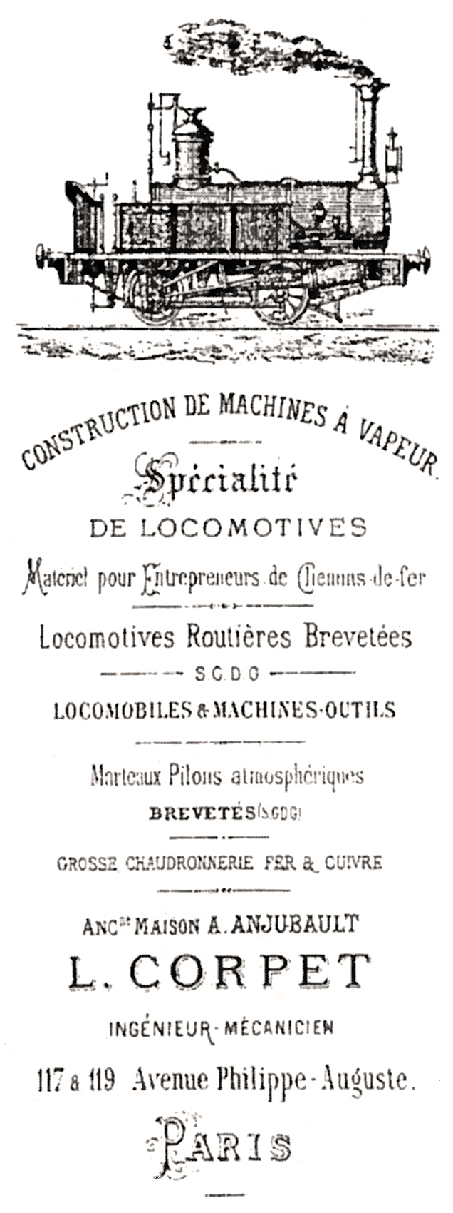 Entête de lettre de L. Louvet avec dessin d'une locomotive et texte : conststruction de machines à vapeur - spécialité de locomotives - Matériel pour Entrepreneurs de Chemins de fer - Locomotives Routières Brevetées SGDO - Locomobiles & Machines-Outils - Marteaux Pilons atmosphériques Brevetés SGDO - Grosse chaudronnerie fer & cuivre - Ancienne Maison A. Anjubault - L. Corpet - Ingénieur Mécanicien - 117 & 119 Avenue Philippe-Auguste Paris.